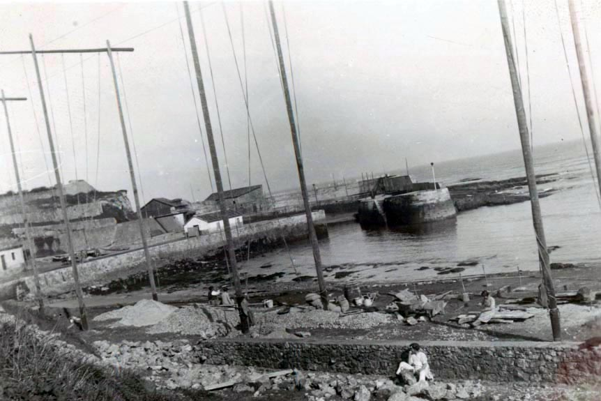 Secaderu de redes de pesca en el puerto de Comillas.